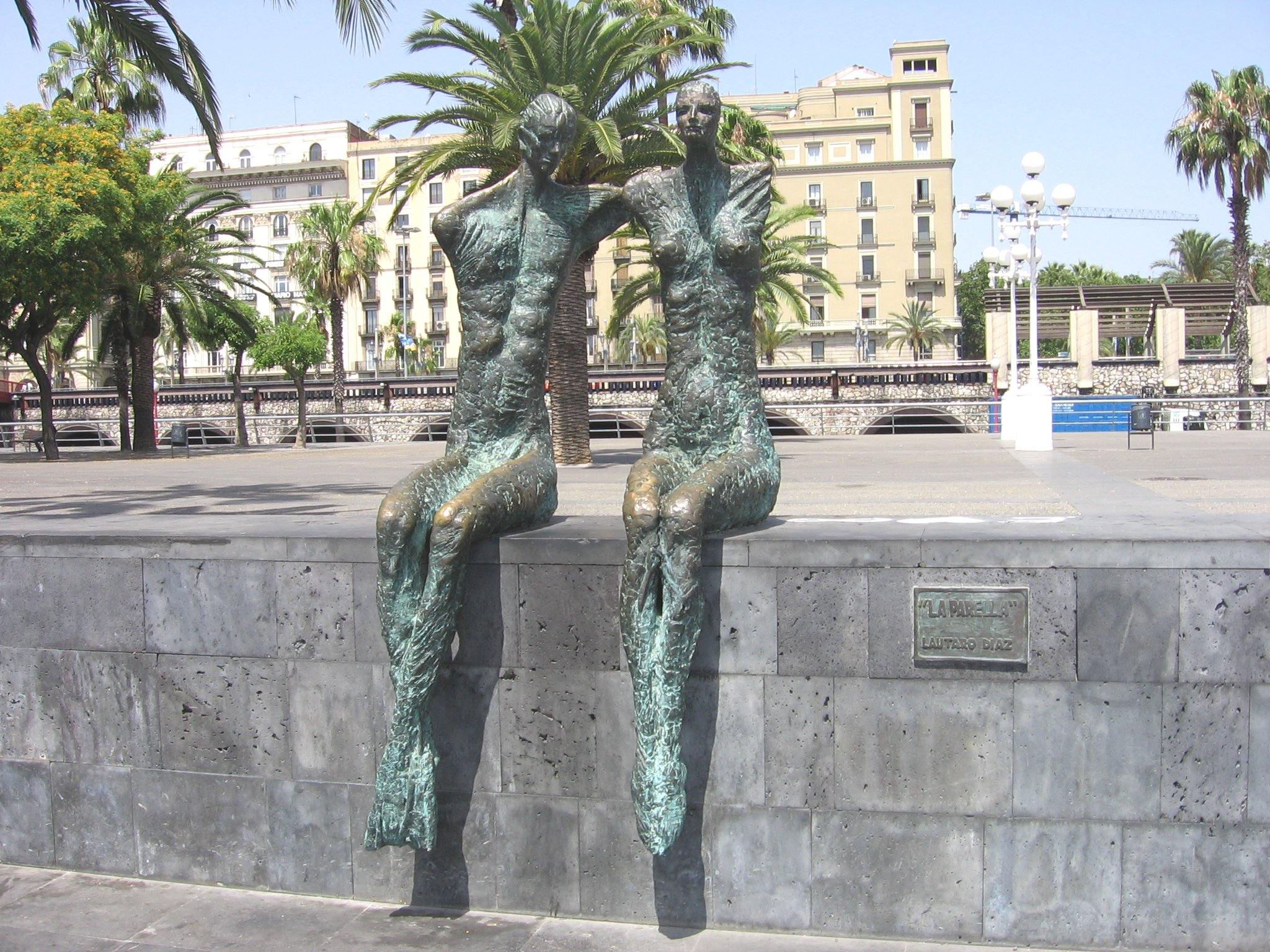 La pareja (2002), de Lautaro Díaz, Muelle de Bosch i Alsina.